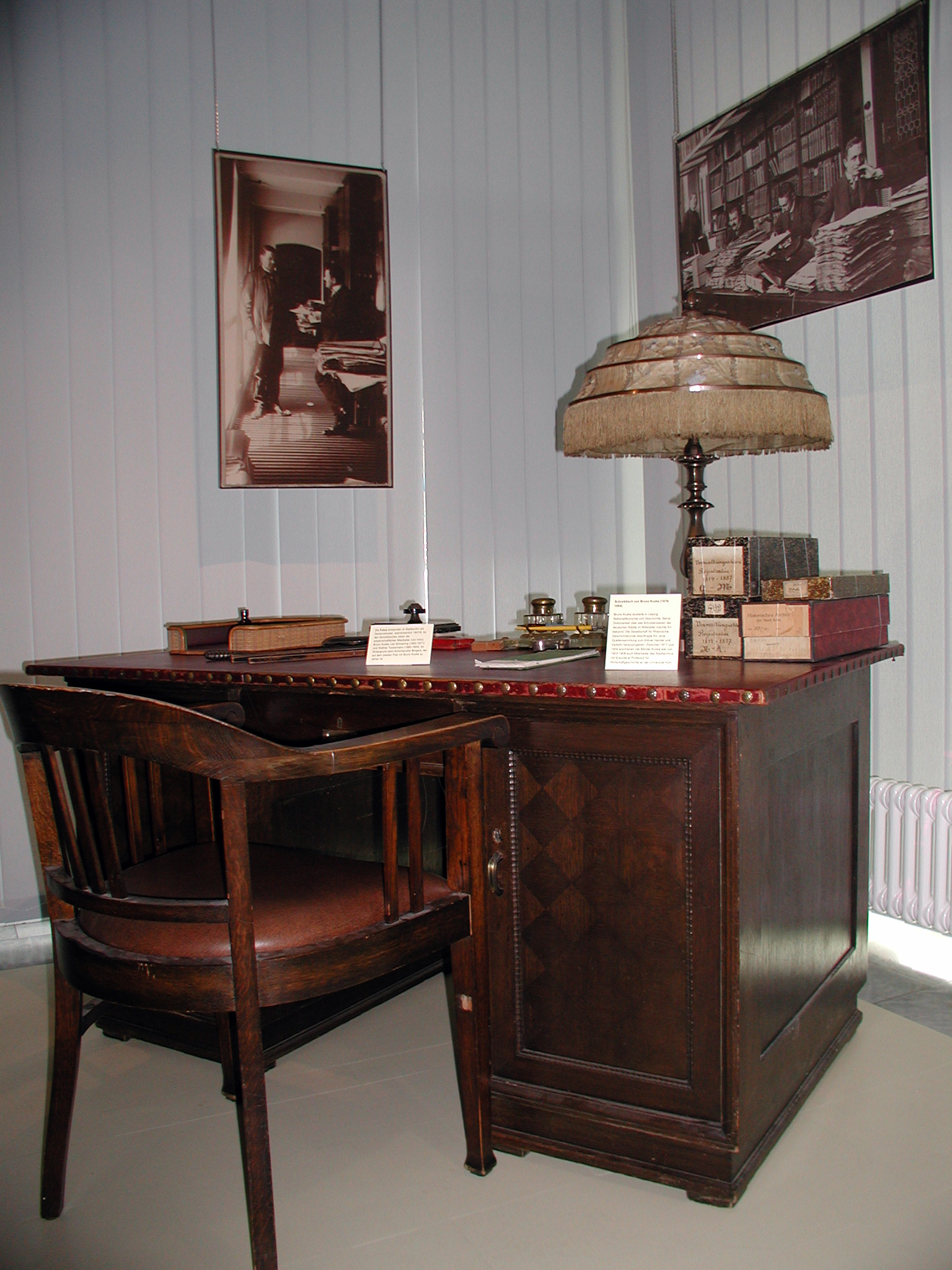 Büroraum um 1890. Beispiel in einer Ausstellung des ehemaligen Stadtarchivs